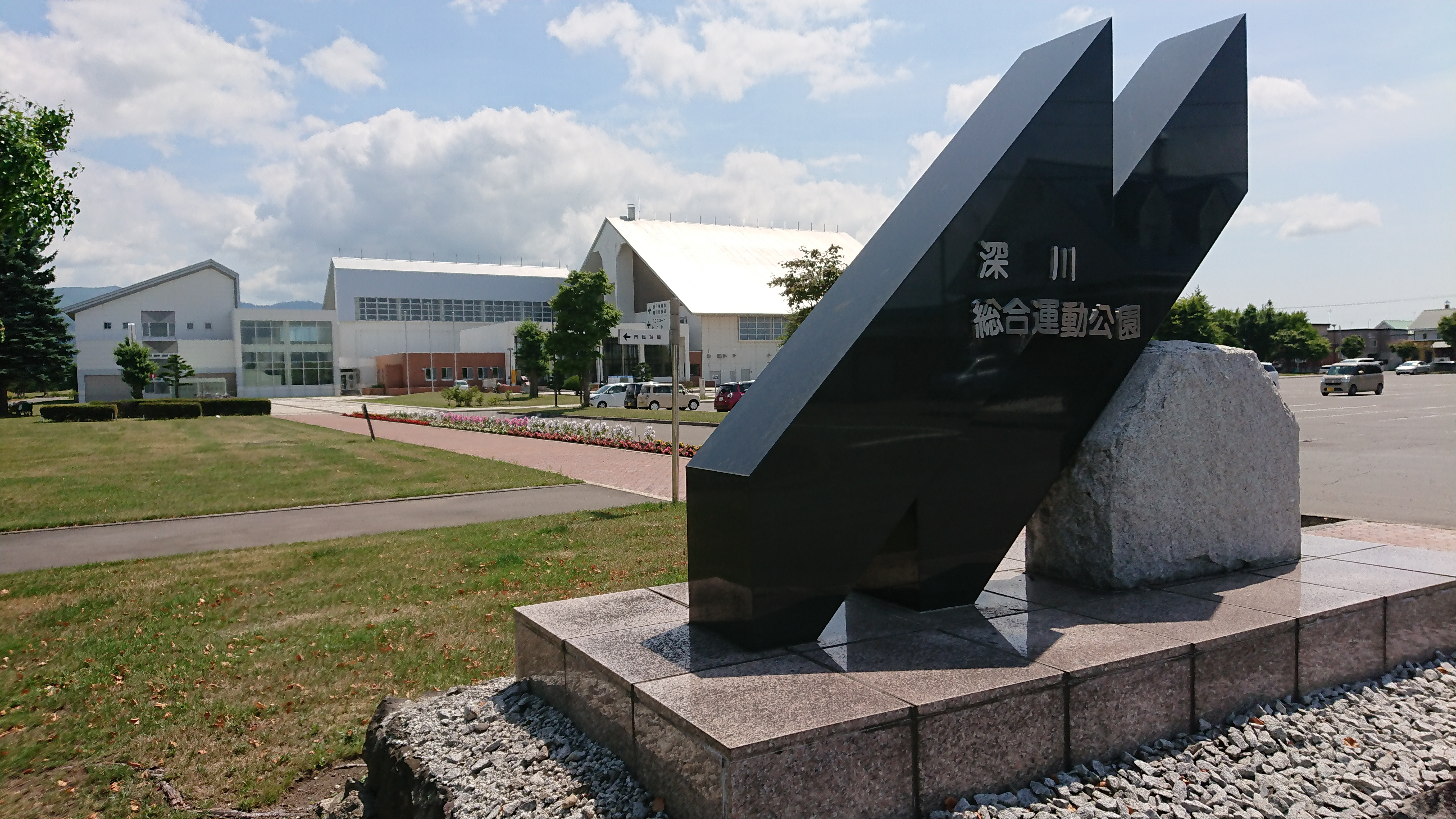 深川市総合運動公園